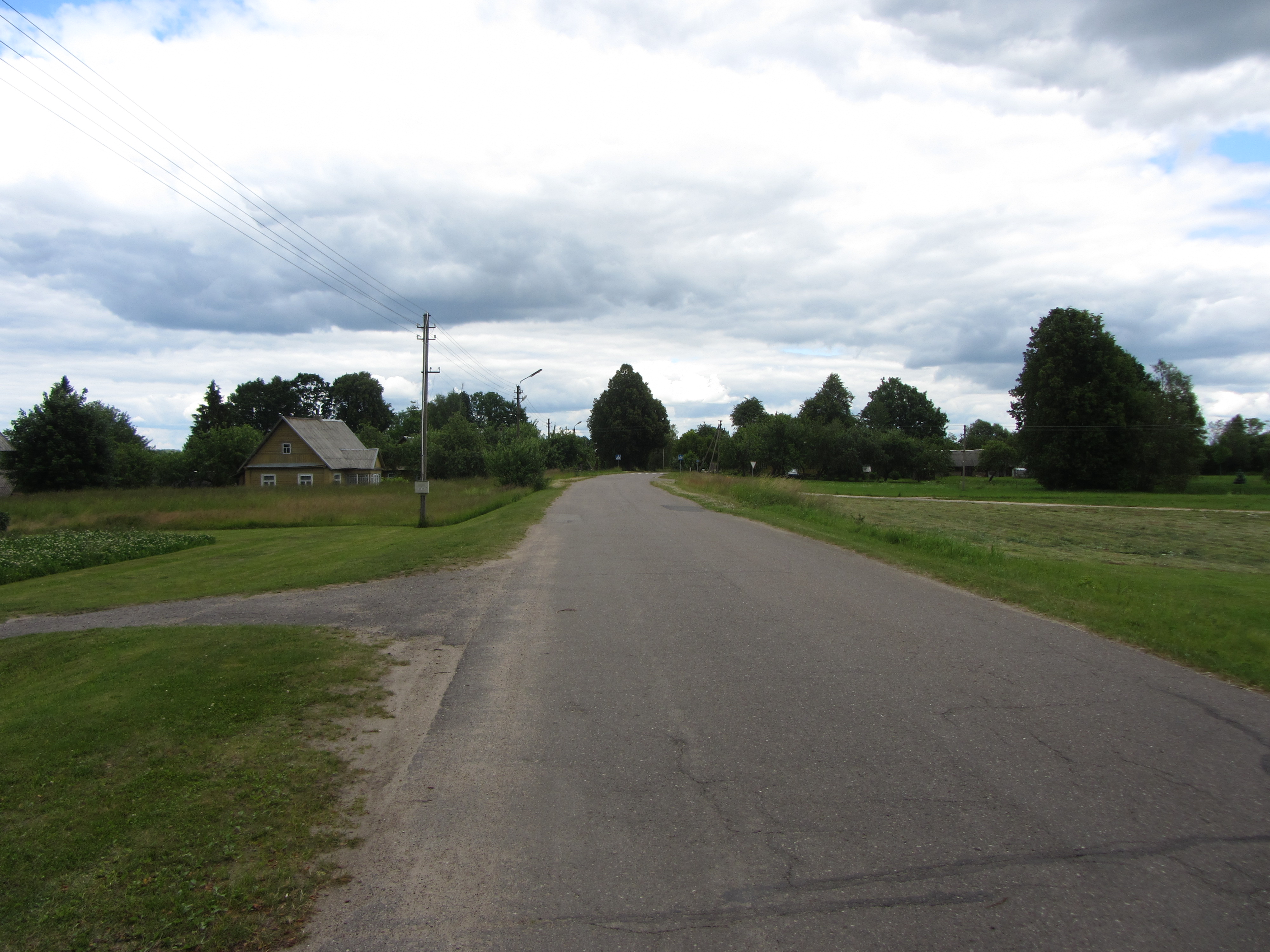 Reškutėnai 18204, Lithuania